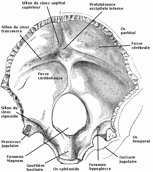 Dessin anatomique de la face interne de l'os occipital, issue de commons et traduit en français par P@d@w@ne